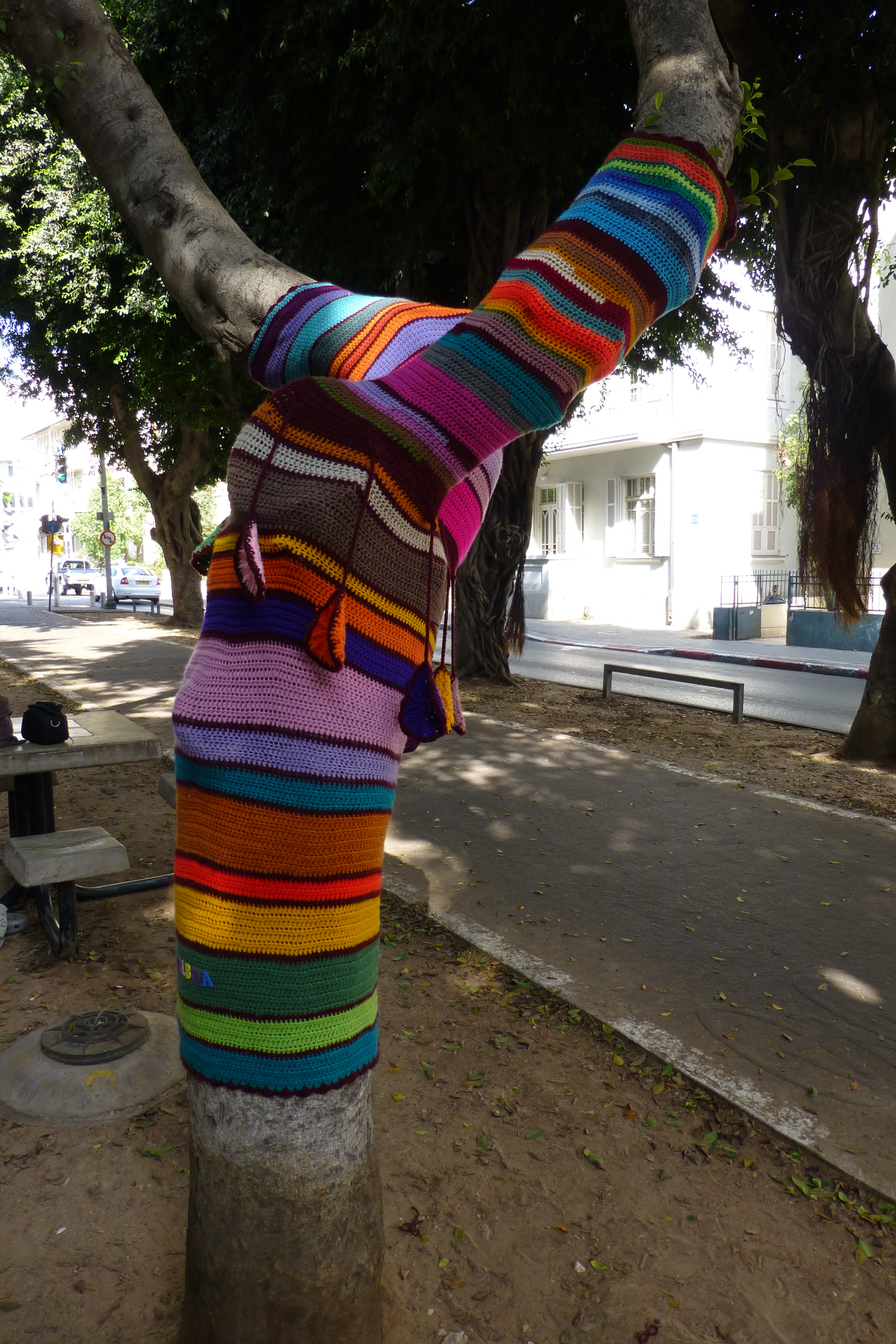 שדרות רוטשילד היו בין ארבעת הרחובות הראשונים של תל אביב (שנקראה אז "אחוזת בית"), שנחנכו לאחר רחוב הרצל (הרחוב הראשון בעיר), ובניצב אליו. הרחובות נסללו על גבי דיונות חול אשר יושרו ושוטחו, ולאורכם נבנו בתיה הראשונים של העיר. התוואי שהפך להיות השדרה היה ואדי קטן שאותו קשה היה ליישר באמצעים של אז, ואליו גם התנקזו מים רבים בחורף. בשל כך הוחלט למלאו בחול להשאירו כשטח פתוח שעליו לא ייבנו בתים אלא בצדיו, כרחוב עירוני רחב יותר. בט"ו בשבט ה'תר"ע (1910) החלו נטיעות בשטח פתוח זה, במטרה להפוך את הרחוב לשדרה הראשונה של העיר. חודשים אחדים לאחר מכן, בדצמבר 1910, החליט ועד אחוזת בית לקרוא לשדרה על שם הברון רוטשילד, ולמנות את מרדכי בן הלל הכהן ואת מאיר דיזנגוף להודיע על כך באופן רשמי לברון. אנשי אחוזת בית ראו בשדרה את תחילתה של שדרה מפוארת כדוגמת הבולווארים המפוארים של פריז.